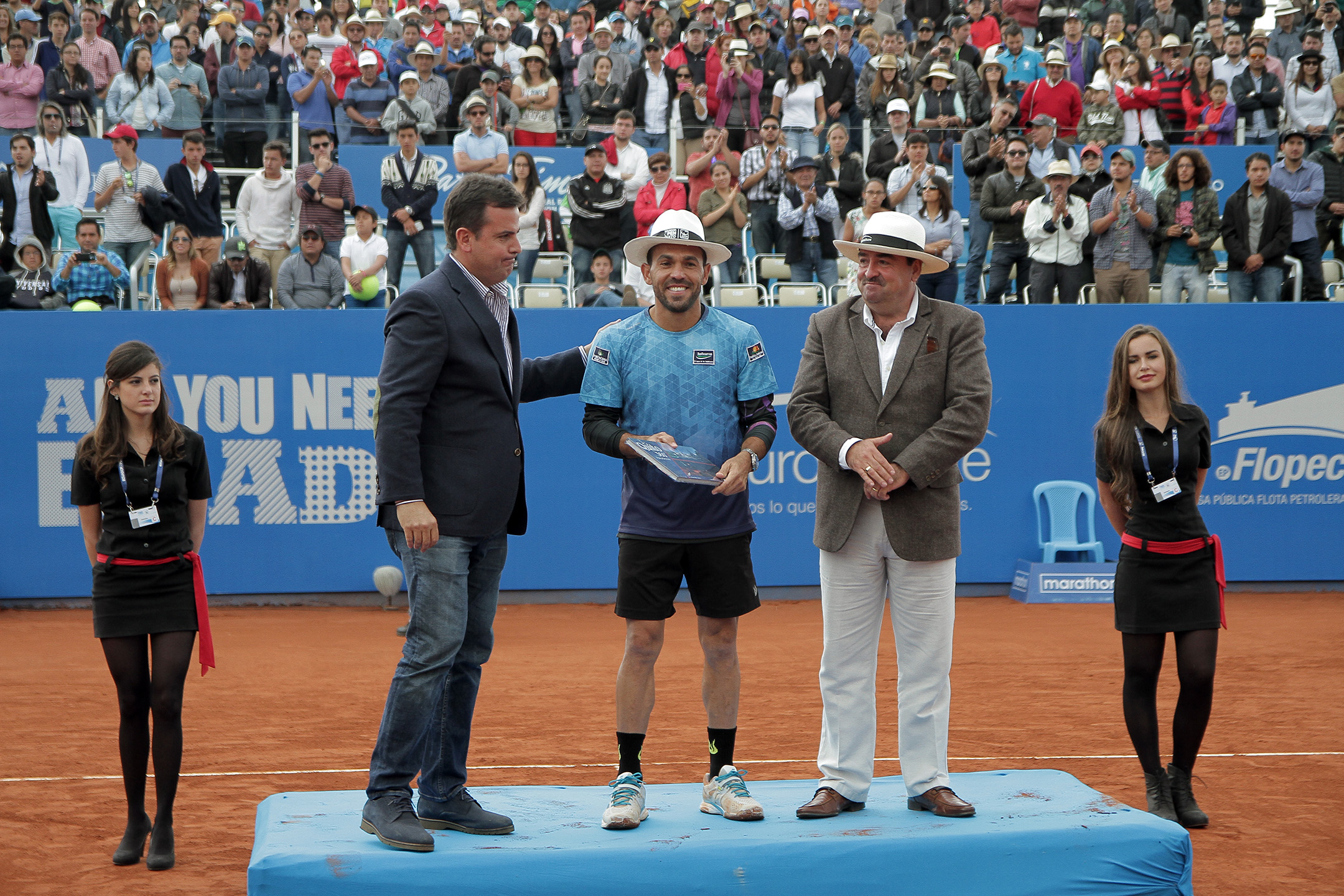 Quito, 08 feb (ANDES).- Final ATP 250 Ecuador Open Quito donde compitieron por el campeonato los tenistas Victor Estrella y Feliciano López. Fotografías: Carlos Rodríguez/ANDES.